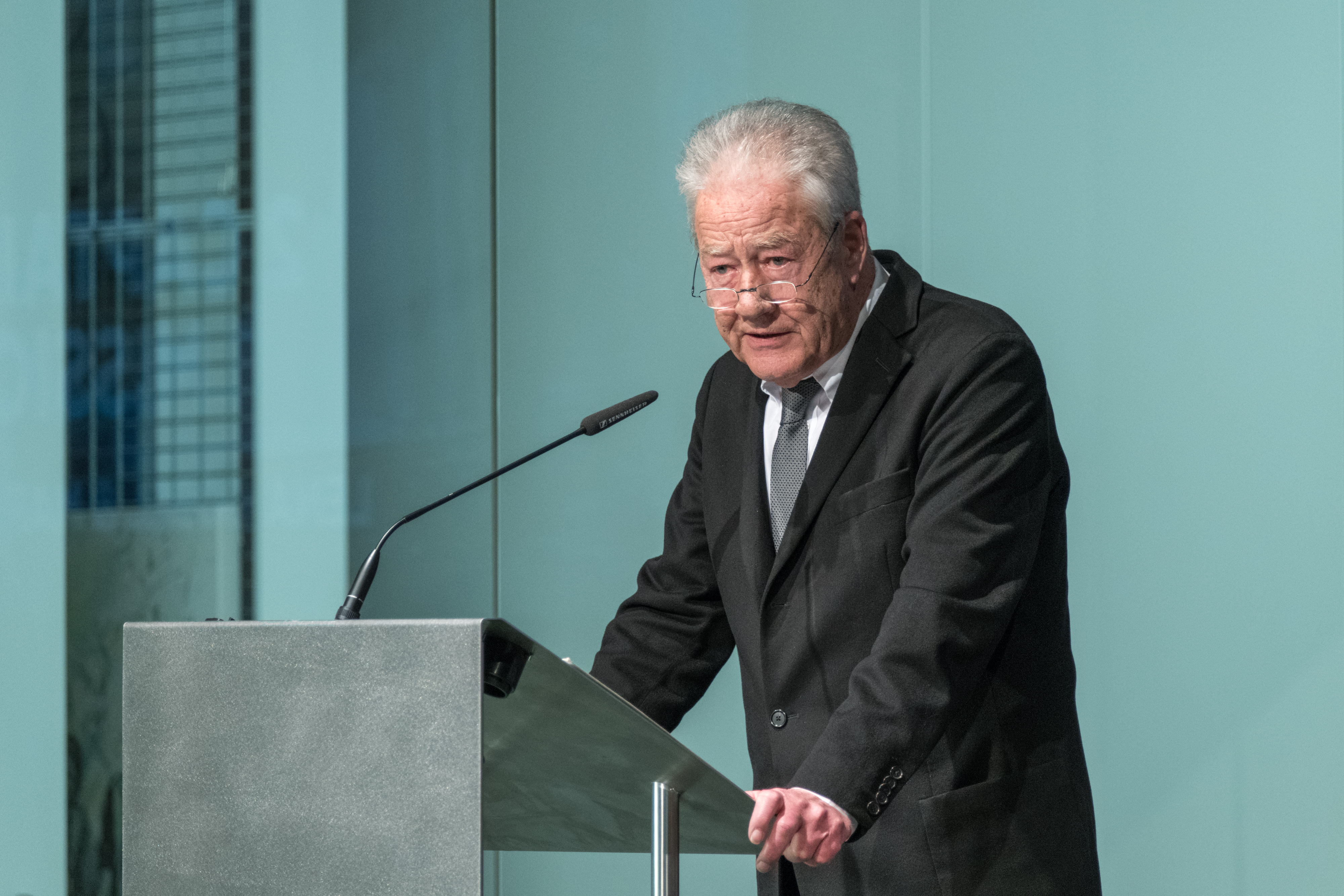 BM a.D. Björn Engholm bei der Eröffnung der Ausstellung Lena Göbel und Maria Moser im Museum Angerlehner, Thalheim bei Wels (Österreich)